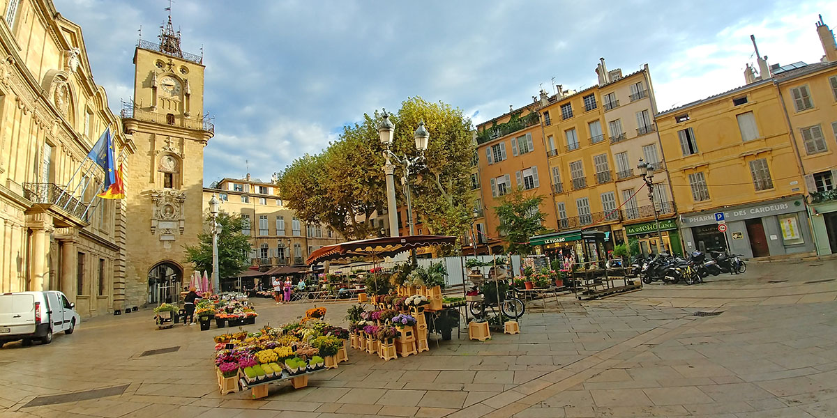 Mercado de flores en la Place de la Mairie, frente a la torre del reloj en Aix-en-Provence.